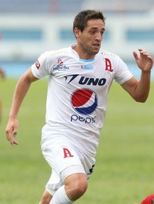 futbolista